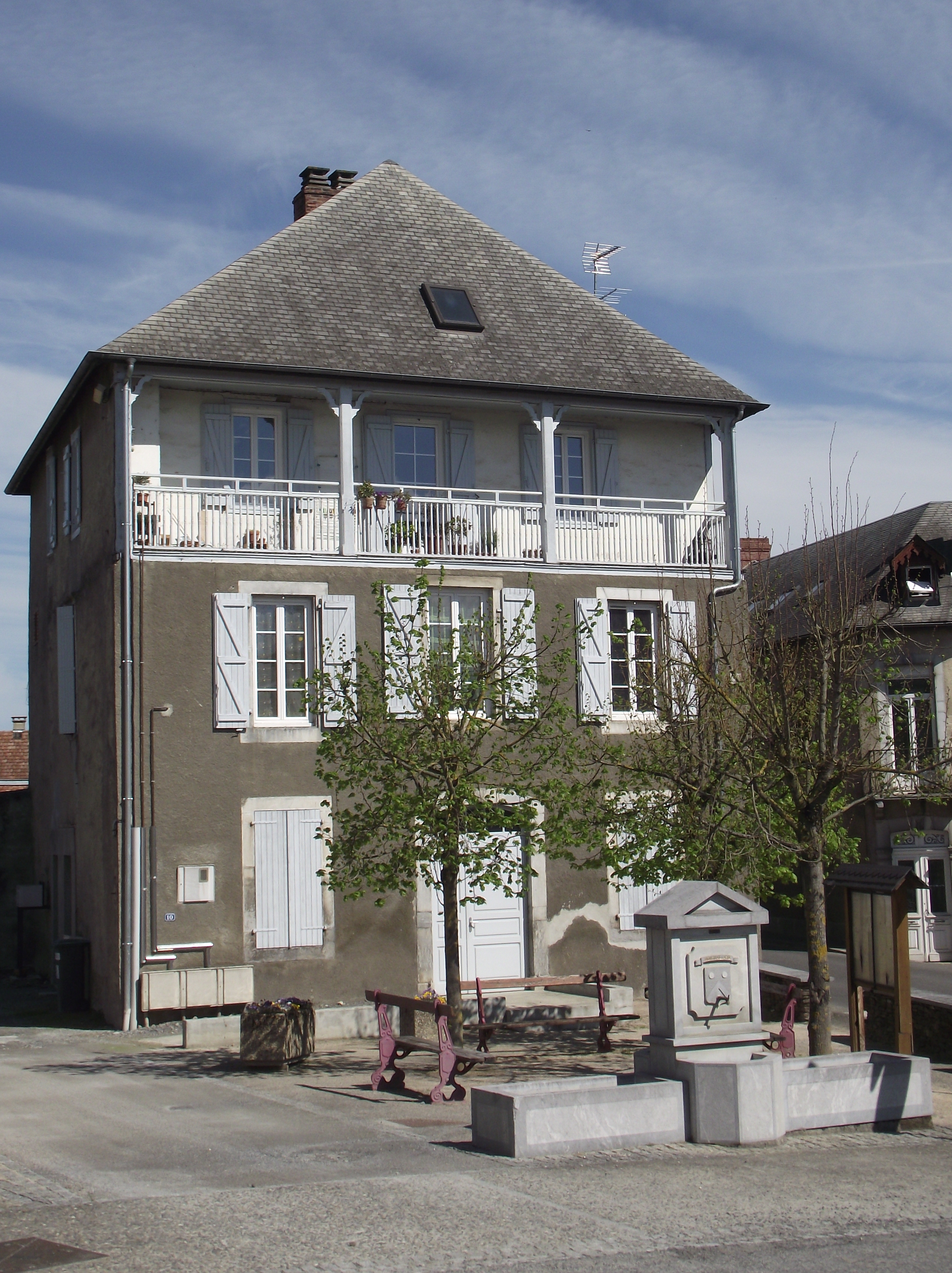 Place de la Mairie (Montgaillard, Hautes-Pyrénées, France)